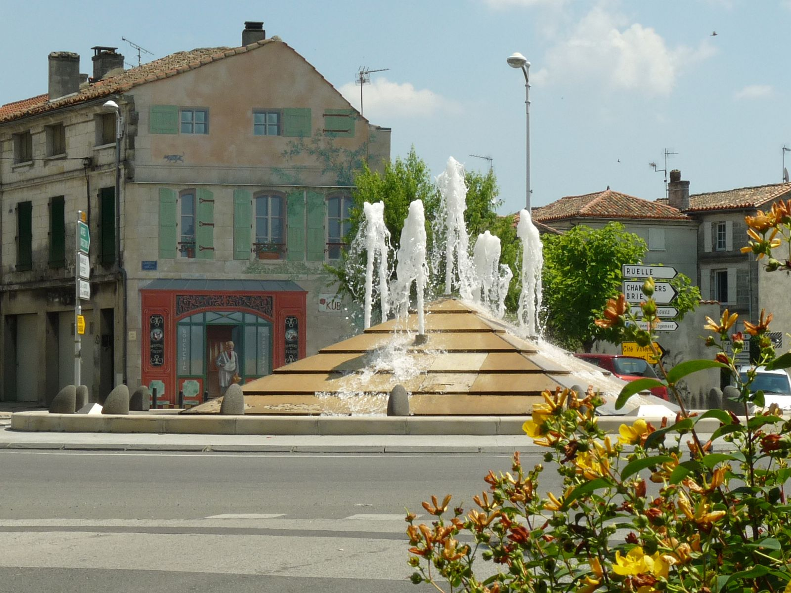 Gond-Pontouvre (16), France. Carrefour routes de Paris et de Roffit au Pontouvre.